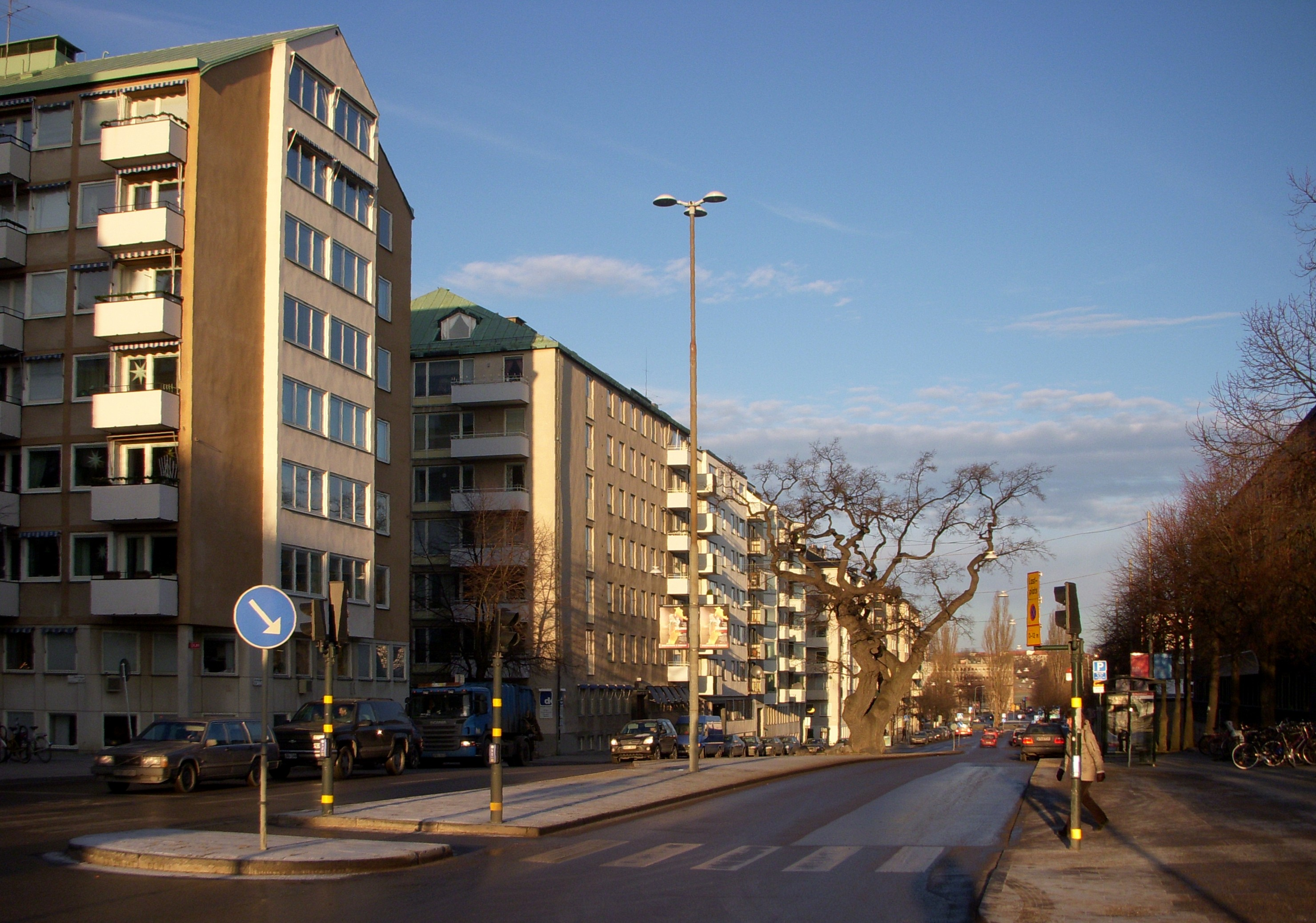 Oxentiernsgatan i Stockholm, vy mot norr